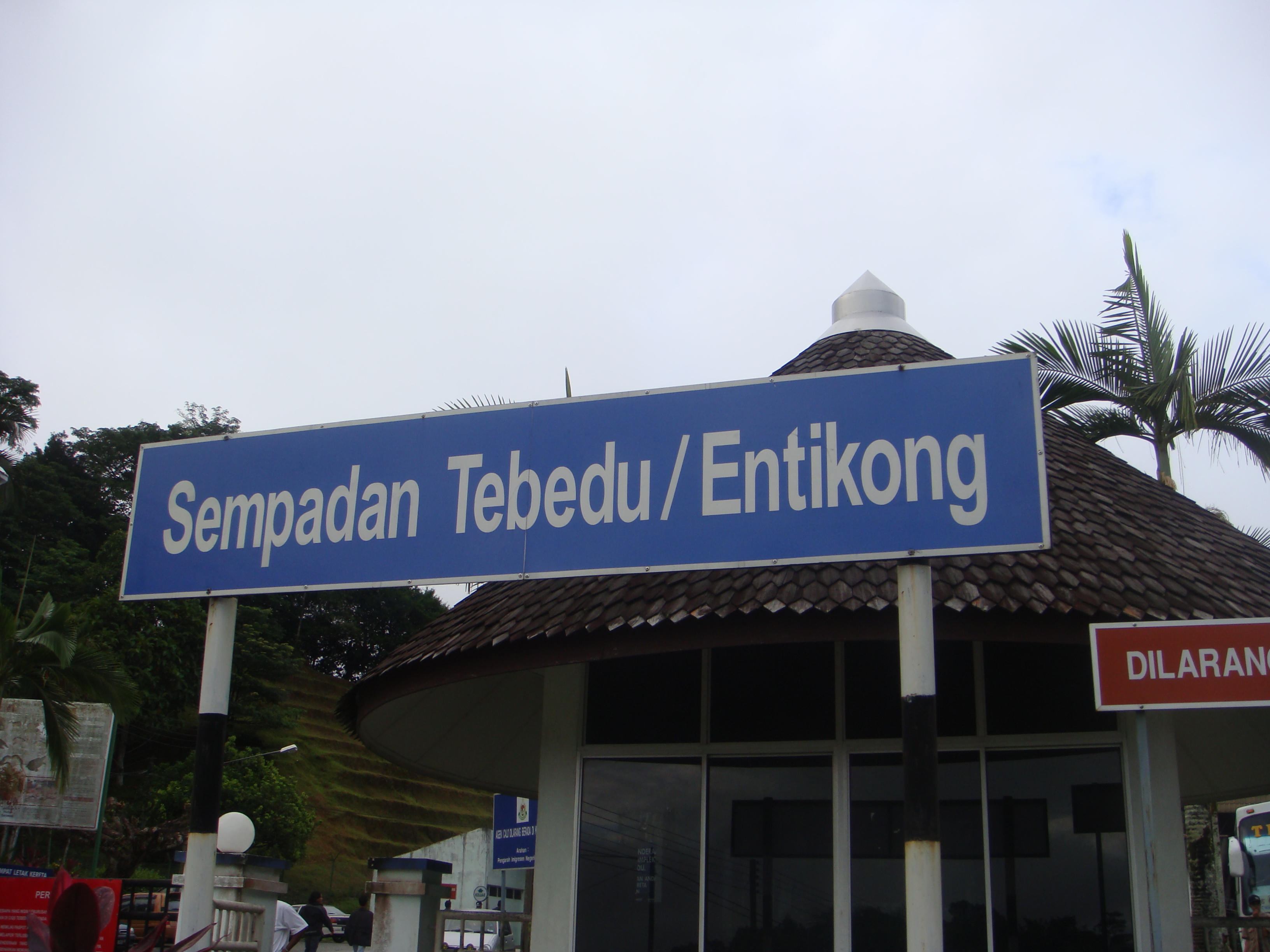 マレーシア(Tebeduとインドネシア(Entikong)の国境(2008.08.31にAmy00が撮影)